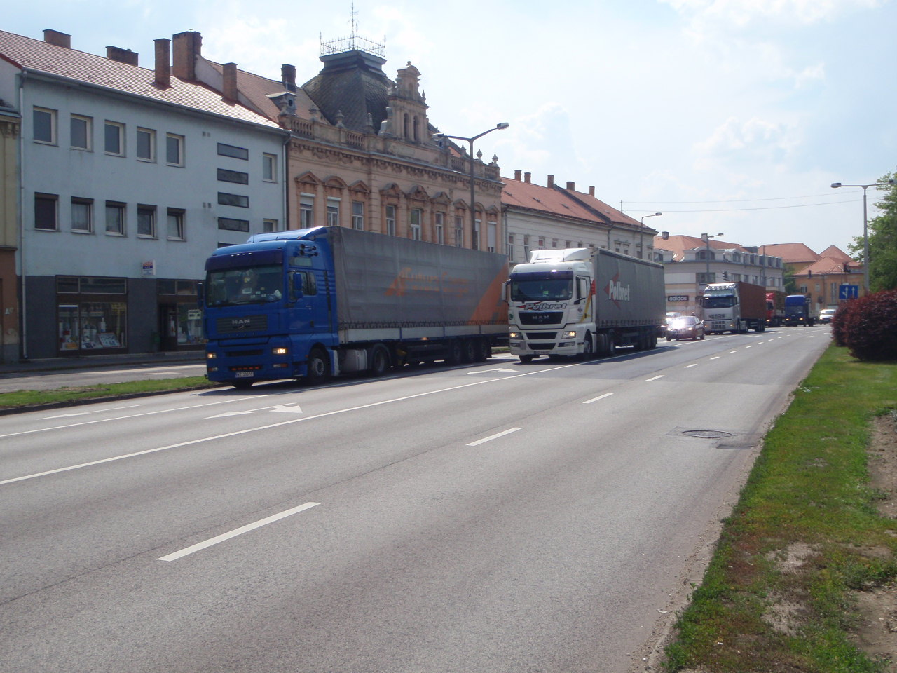 Csorna belvárosa Soproni út